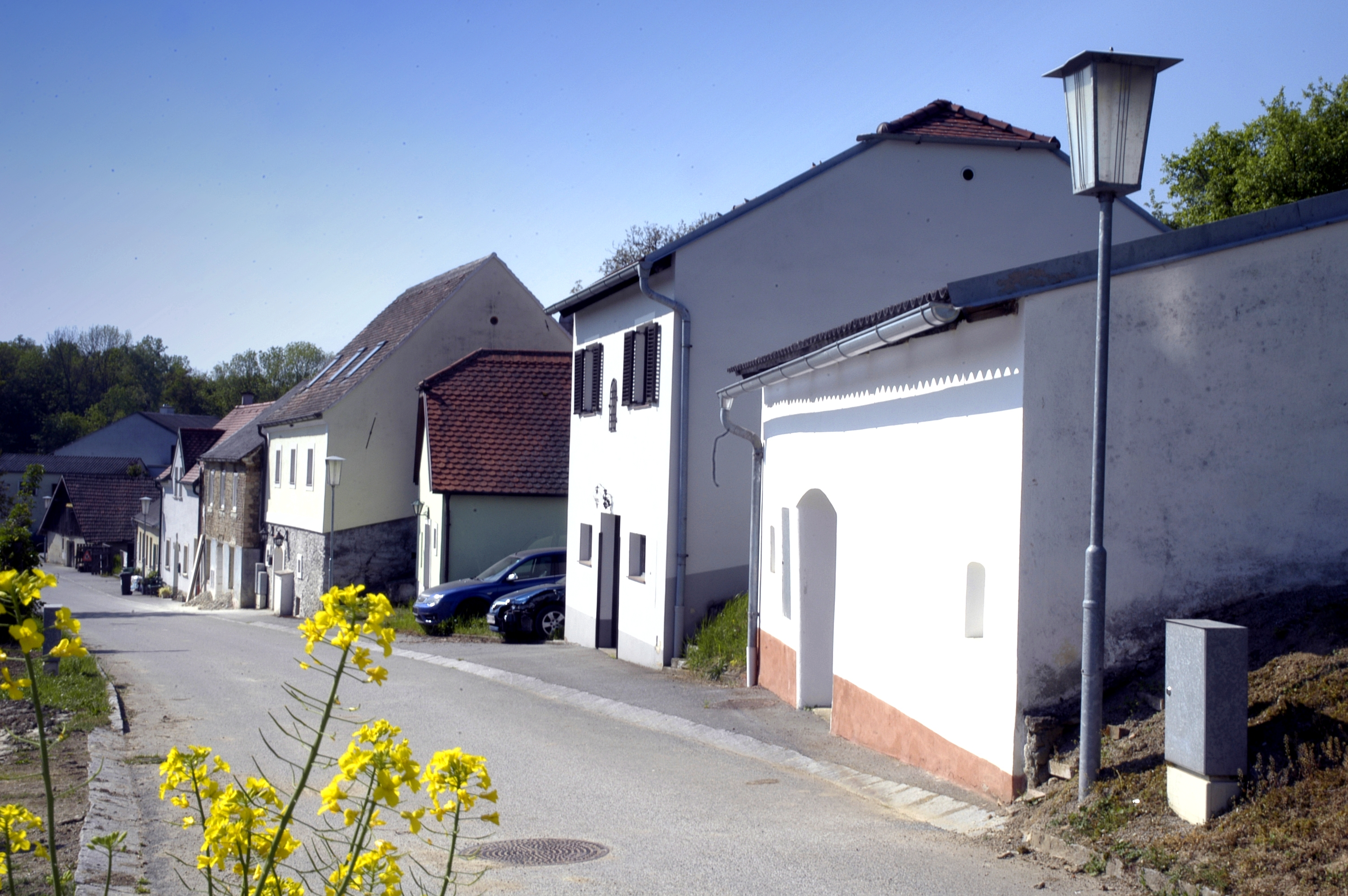 Kellergasse in Roggendorf, Gemeinde Röschitz, unterer (östlicher) Teil